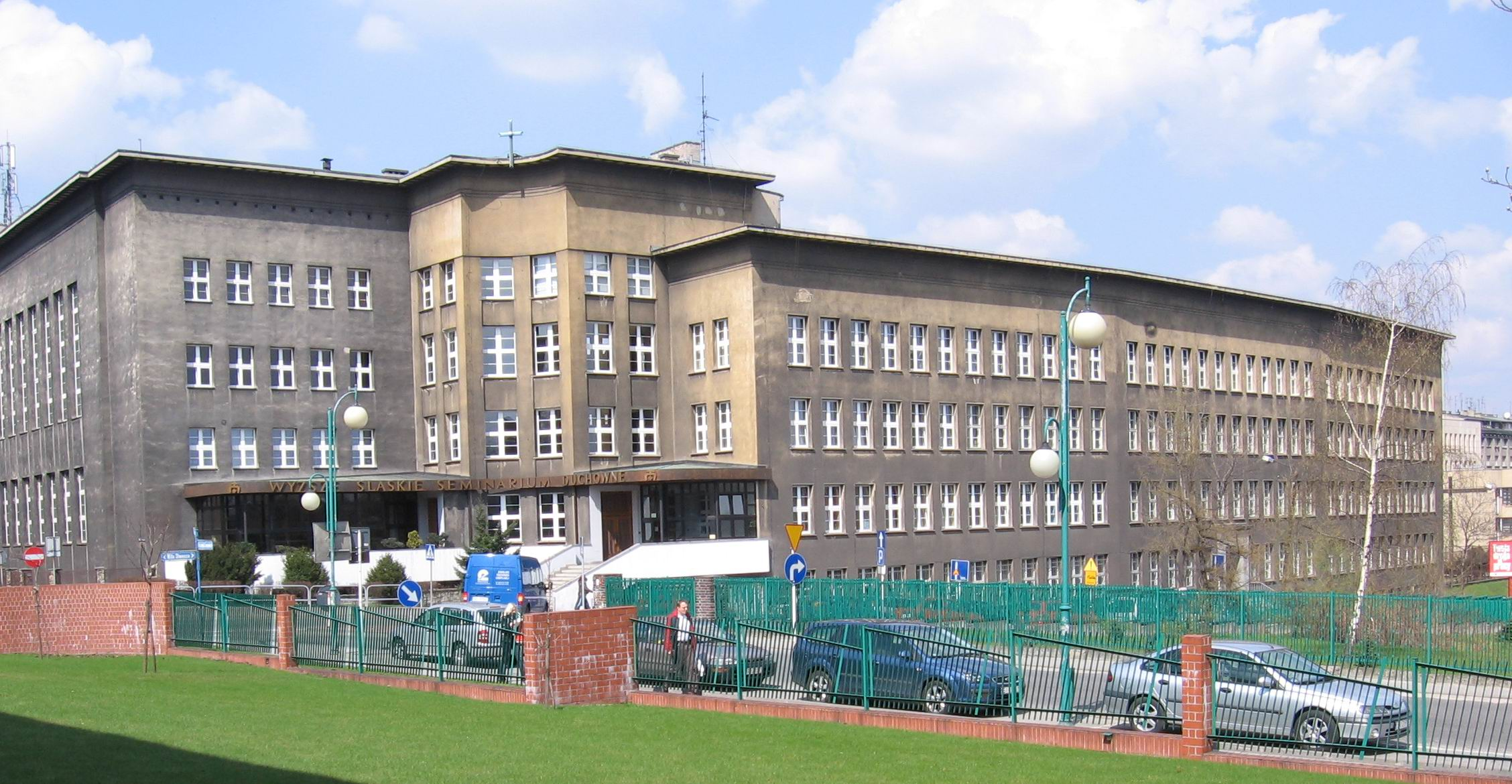 Budynek Wyższego Śląskiego Seminarium Duchownego w Katowicach